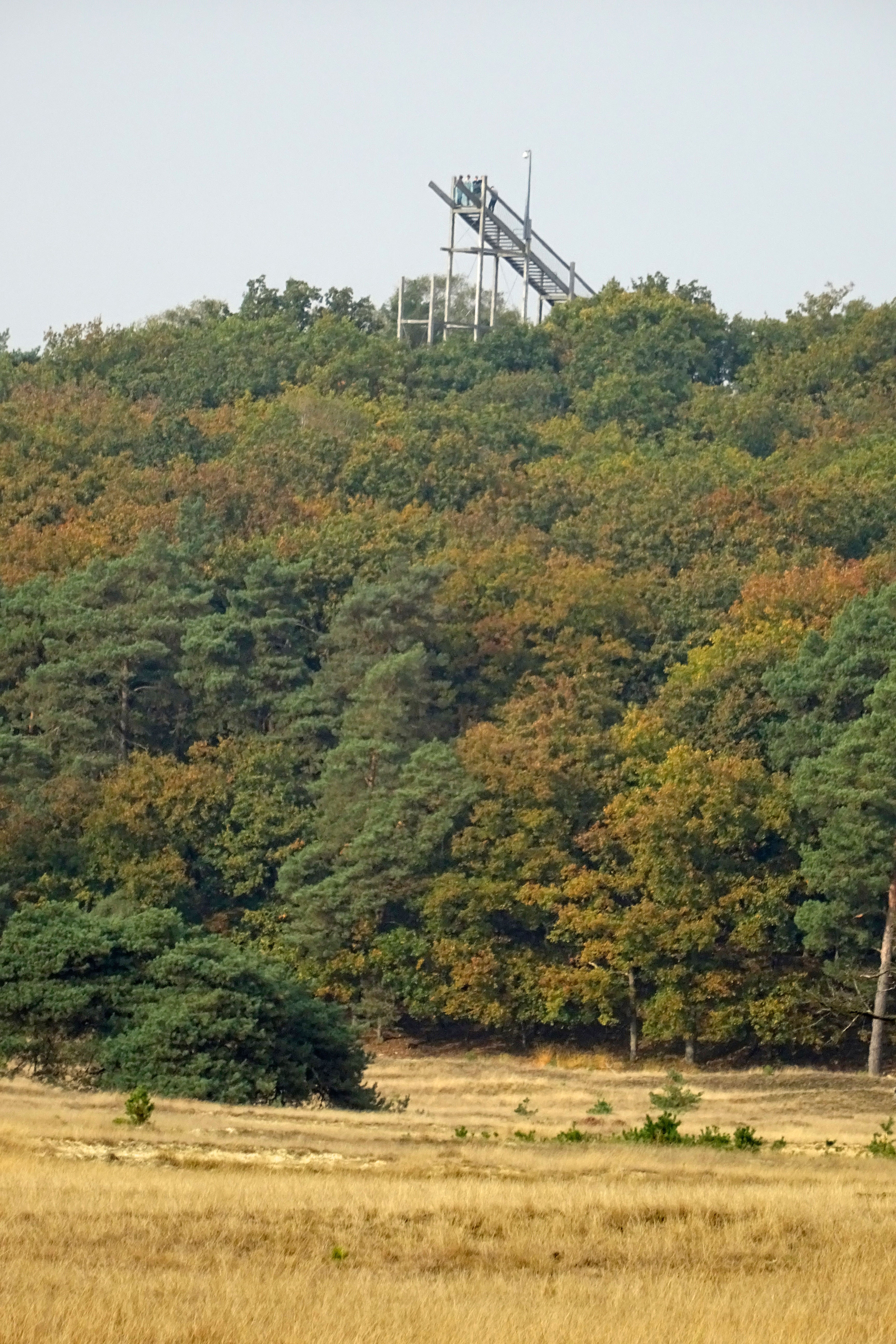 Kijk uit Attention door Krijn Giezen - Franse Berg en het Pampelse Zand